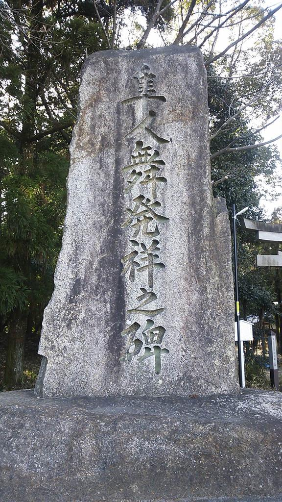 隼人舞伝承地之碑